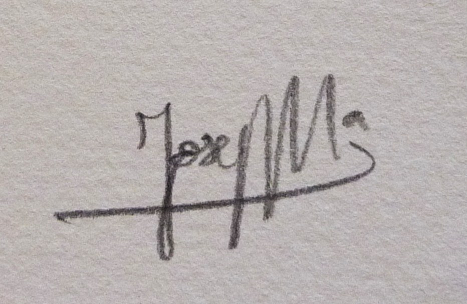 Signature de l'écrivain catalan Josep Maria Ripoll